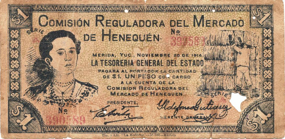 Billete que emitió el general golpista Abel Ortiz Argumedo en 1914 para "respaldar" los fondos con los que exaccionó a los industriales del henequén durante su breve mandato.